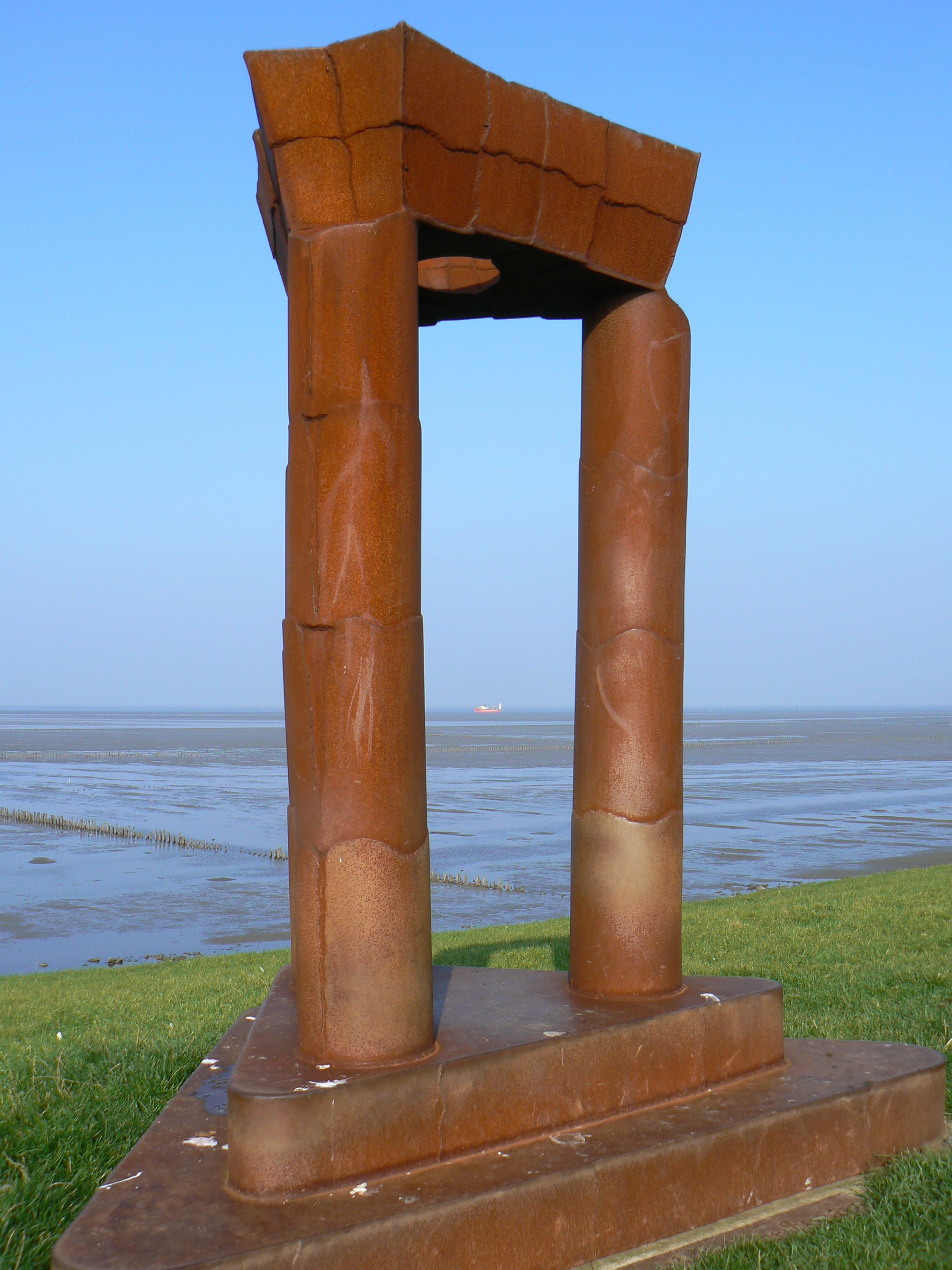 sculpture Poort Kaap Noord (2202) by R.de Boer in Uithuizermeeden/The Netherlands